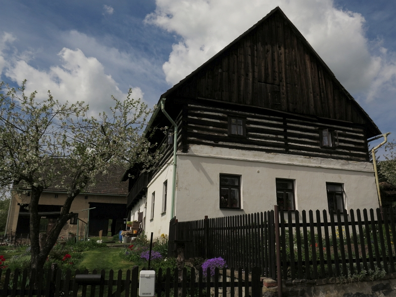 Usedlost čp. 10, Třebín 10, Třebín (Úštěk).